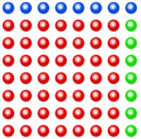 La méthode de calculer des carrés parfait chez les grecs